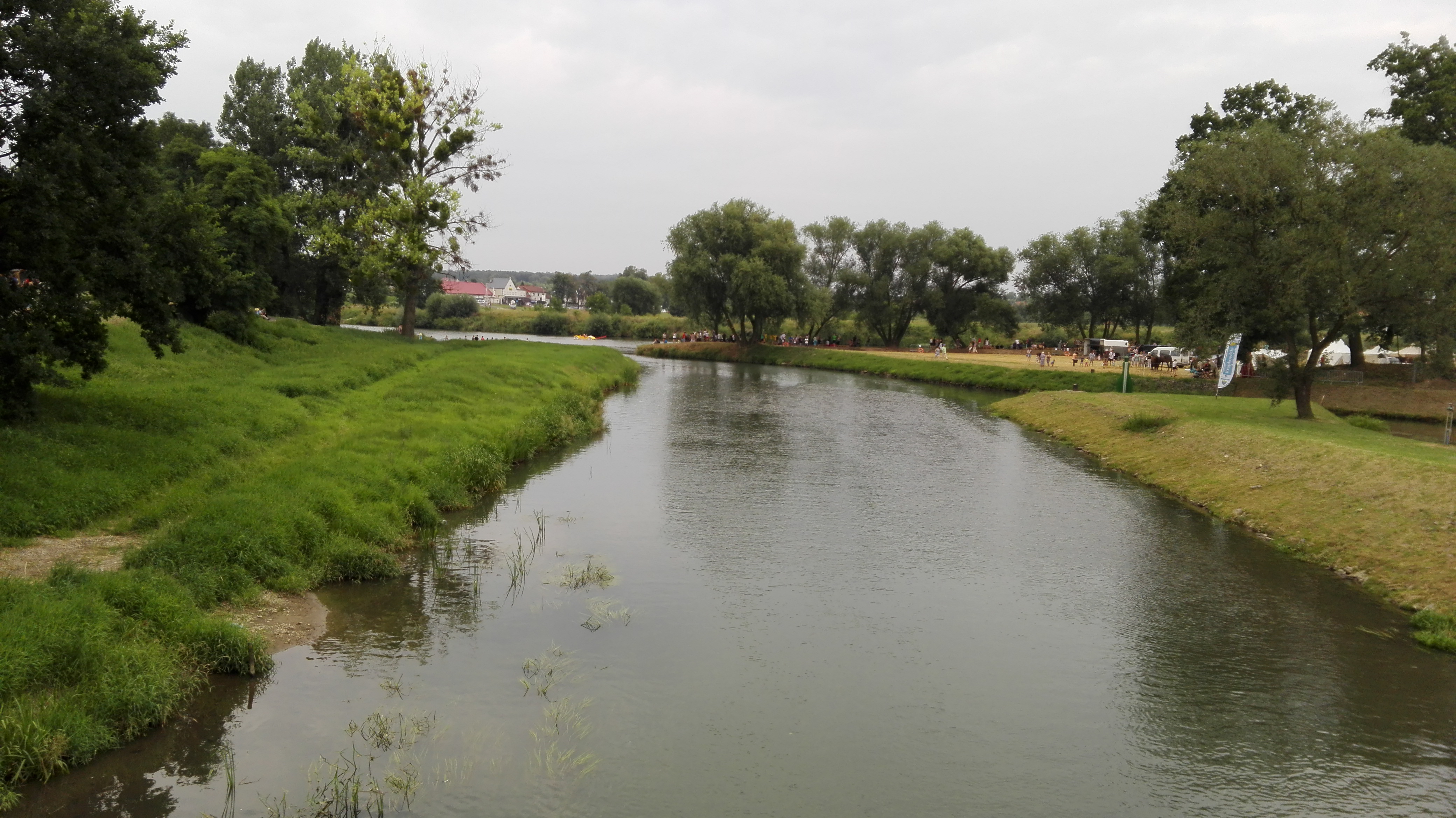 Ujście rzeki Osobłogi do Odry. Po prawo, port jachtowy (marina).